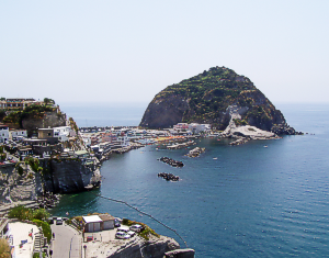 Sant Angelo - typický pohled na nejjižnější výběžek ostrova Ischia